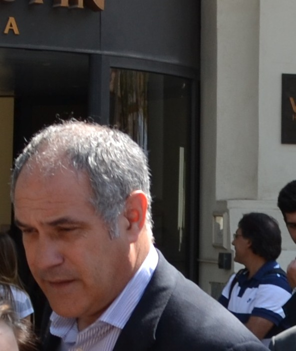 Andoni Zubizarreta en Valencia el 1 de septiembre de 2013, antes de disputarse ese día el partido de fútbol de Liga entre el FC Barcelona y el Valencia CF.